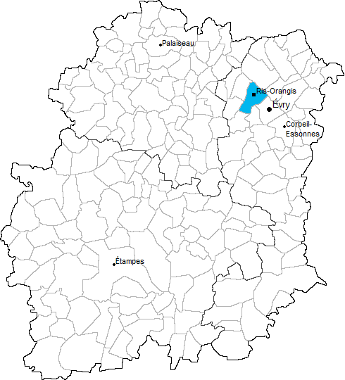 Carte de localisation du canton de Ris-Orangis en Essonne (91)